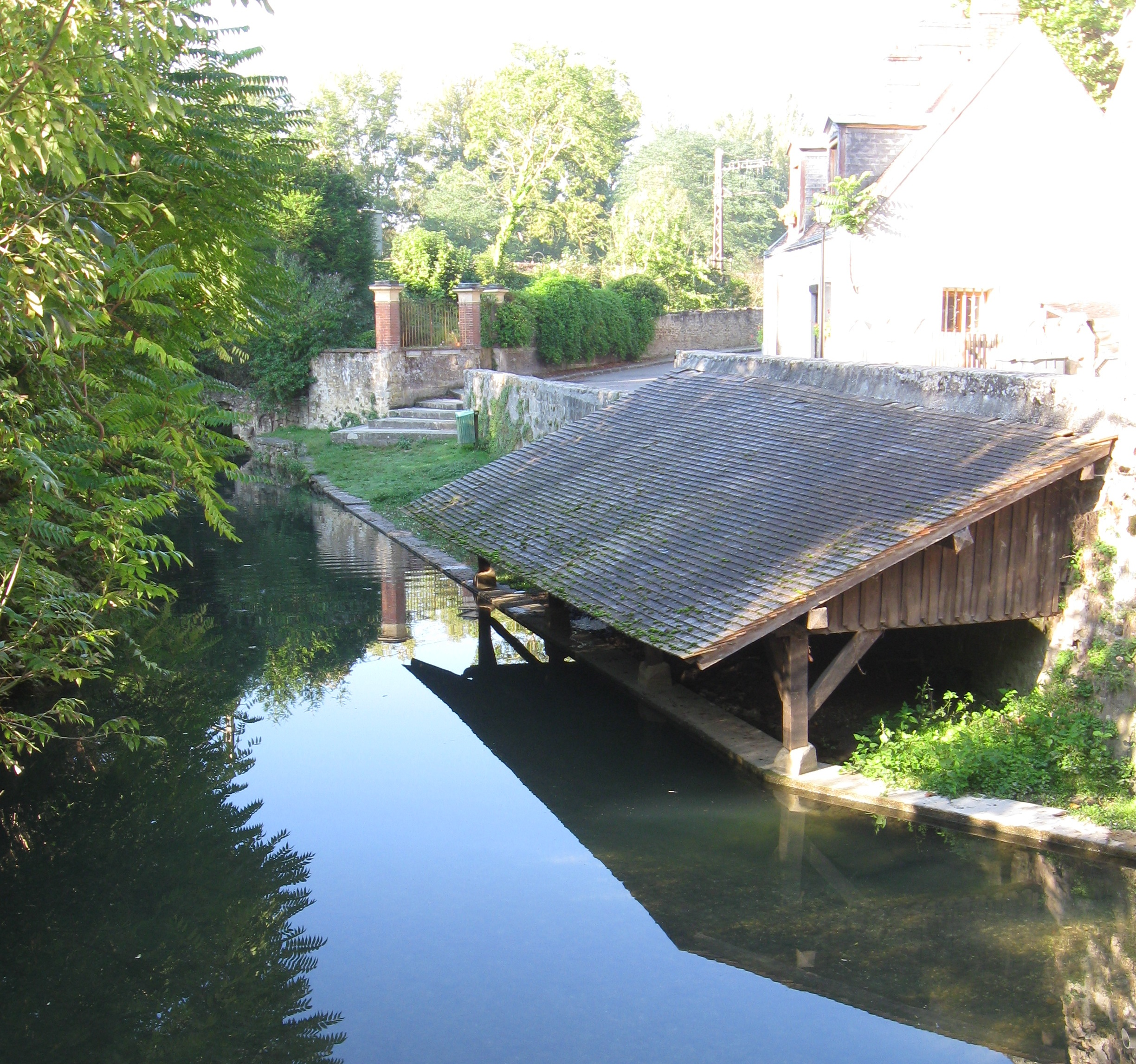 Lavoir sur le ru du Châtelet. (Fontaine-le-Port, Seine-et-Marne, région Île-de-France).